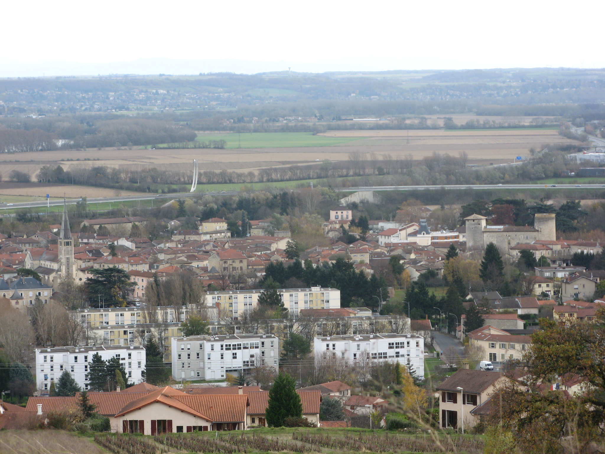 Vue de Anse (Rhône) depuis les hauteurs. On aperçoit à gauche l'église et à droite le château des deux tours. Au centre, on voit le signe infini, œuvre qui marque la jonction des autoroutes A6 et A46.